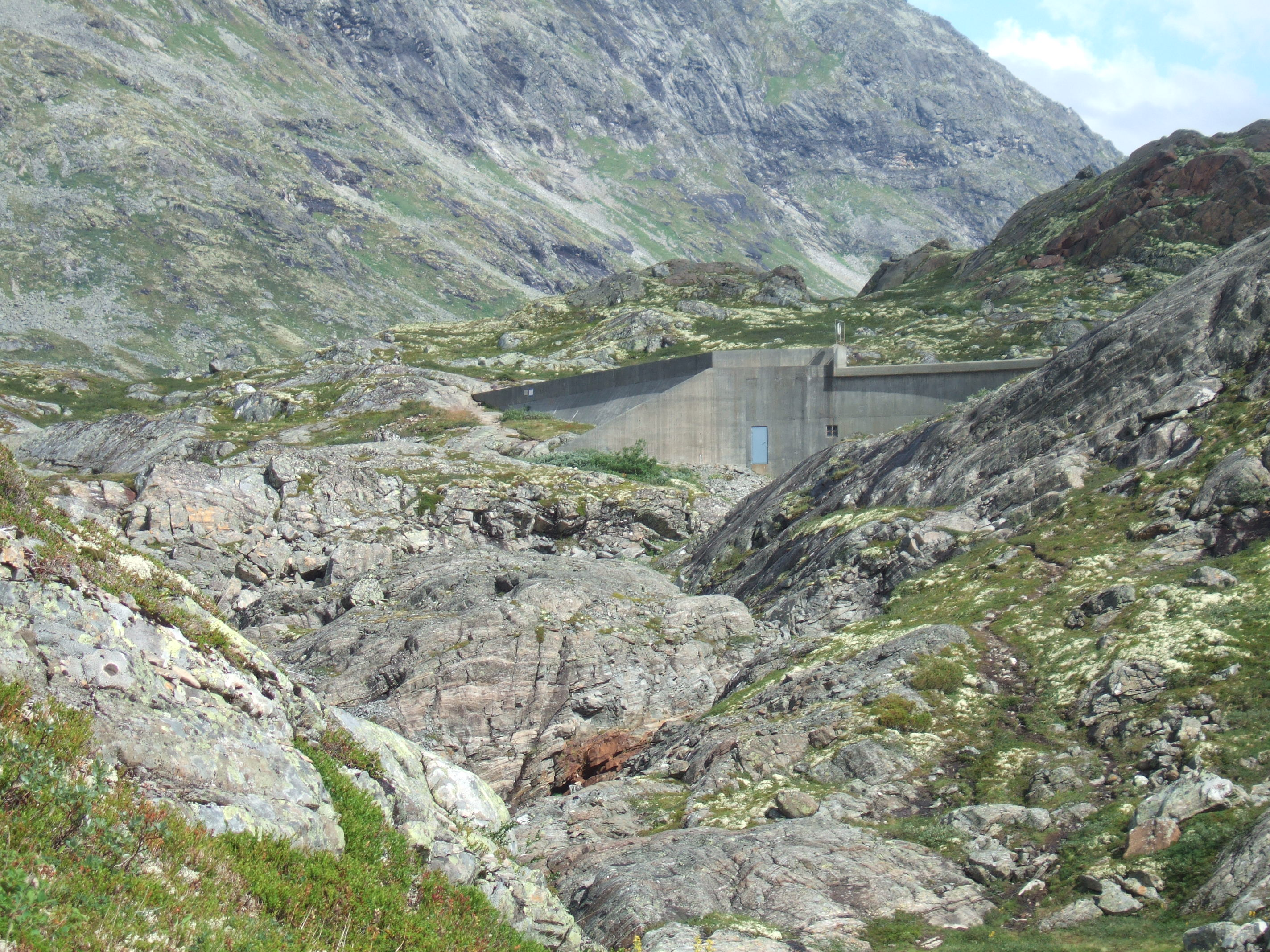 Gravdalsdammen i Gravdalen i Jotunheimen. Fra dammen overføres vannet i en tunnel gjennom store deler av nasjonalparken til Tyin kraftverk.